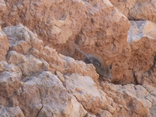 גרביל בנגב, בנחל פארן